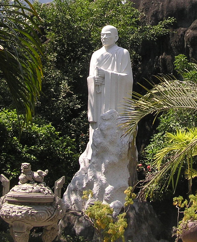 Статуя монаха Тхить Куанг Дык во дворе пагоды Лонг Шон